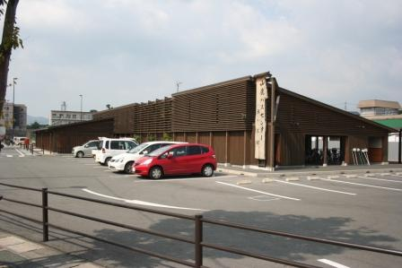 山鹿バスの駅の画像です